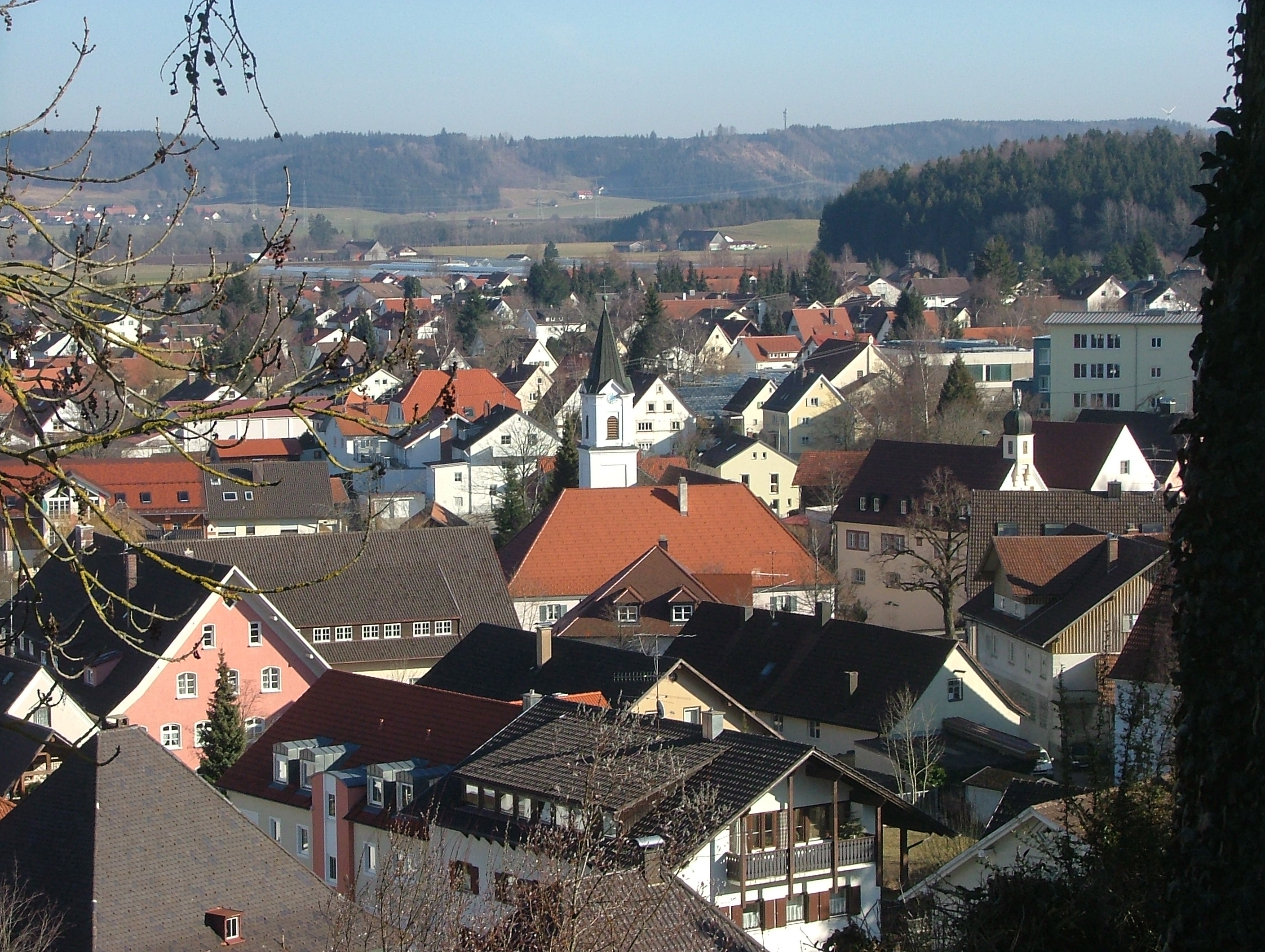 Bad Grönenbach